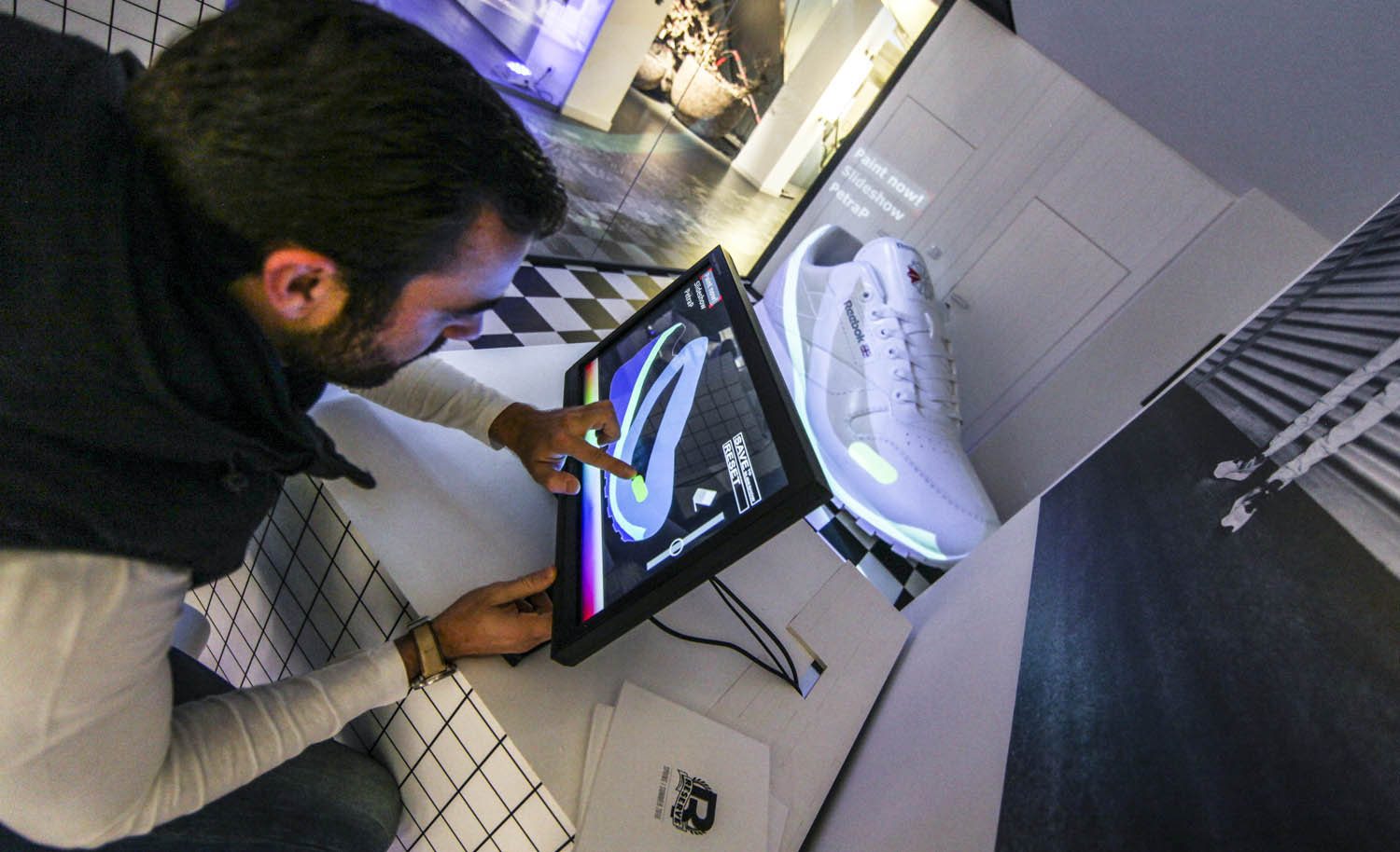 Teniskology 2015